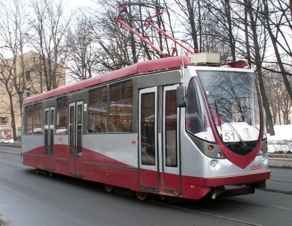 Трамвайный вагон ЛМ-99АВ 0505 на ул. Комсомола